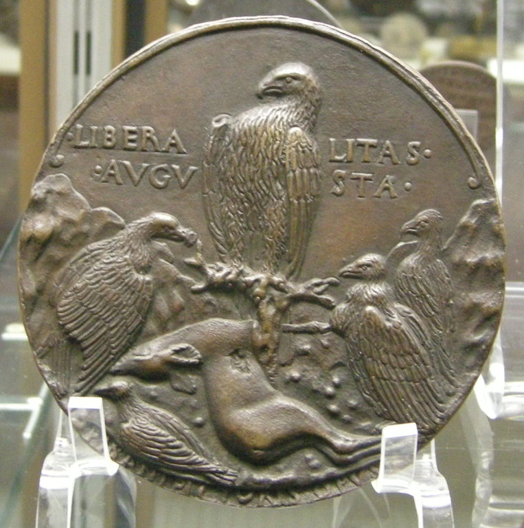 CdM, pisanello, medaglia di alfonso d'este verso